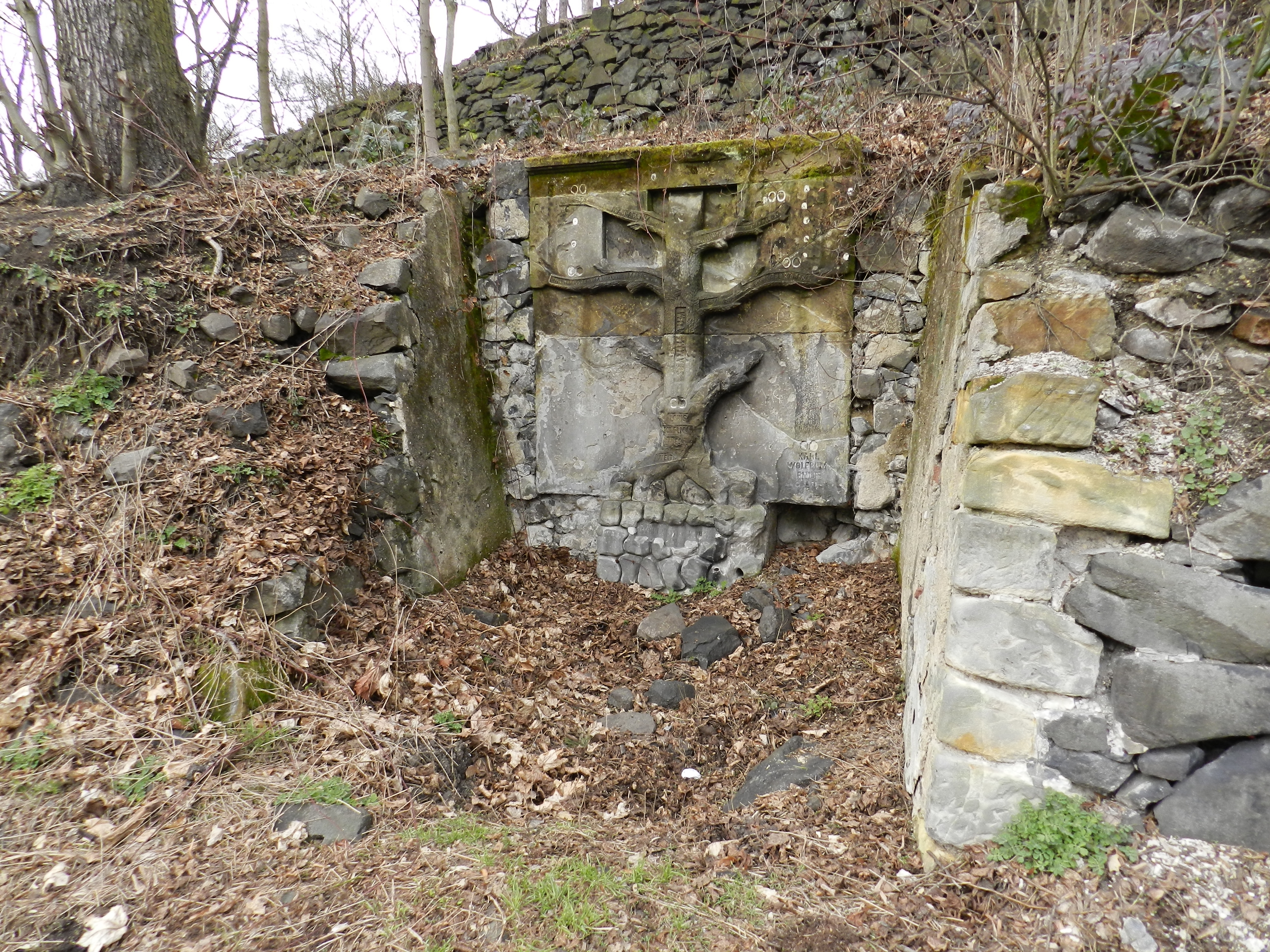 Rodokmen Wolfrumů v Krásném Březně v terasách kopce při cestě k Mlýništi